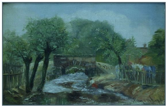 unten rechts handsigniert "L Pagenkopf", doubliert auf Malkarton